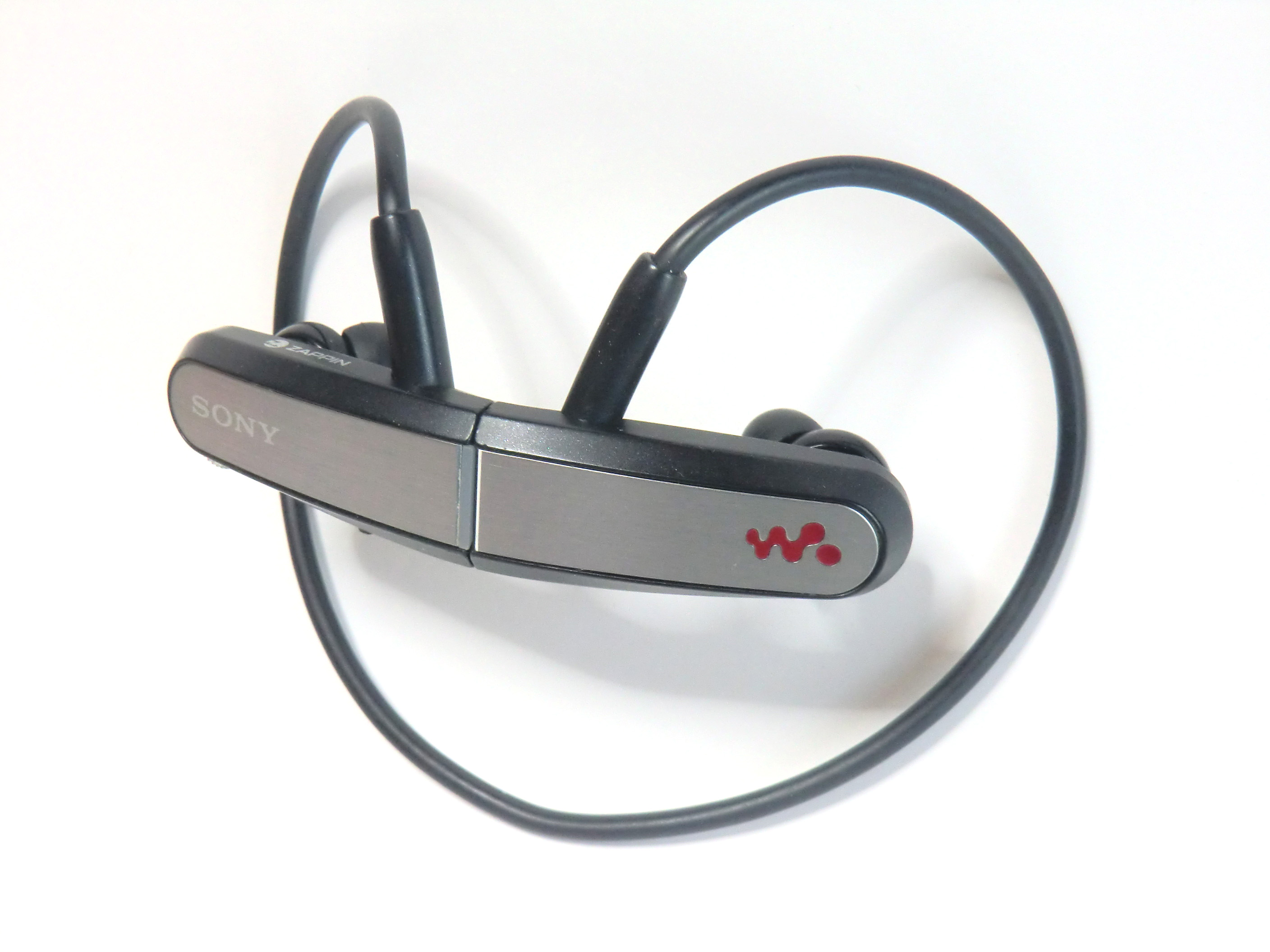 ウォークマンNWD-W202